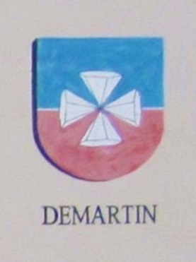 Cognomi storici dei Vicini che discendono dalle famiglie della Regola che abitavano a Predazzo e riguardano 19 cognomi: Boninsegna, Bonora, Bosin, Brigadoi, Defrancesco, Degaudenz, Dellagiacoma, Dellantonio, Dellasega, Demartin, Dezulian, Felicetti, Gabrielli, Giacomelli, Guadagnini, Morandini, Nicolao, Piazzi e Zanna.